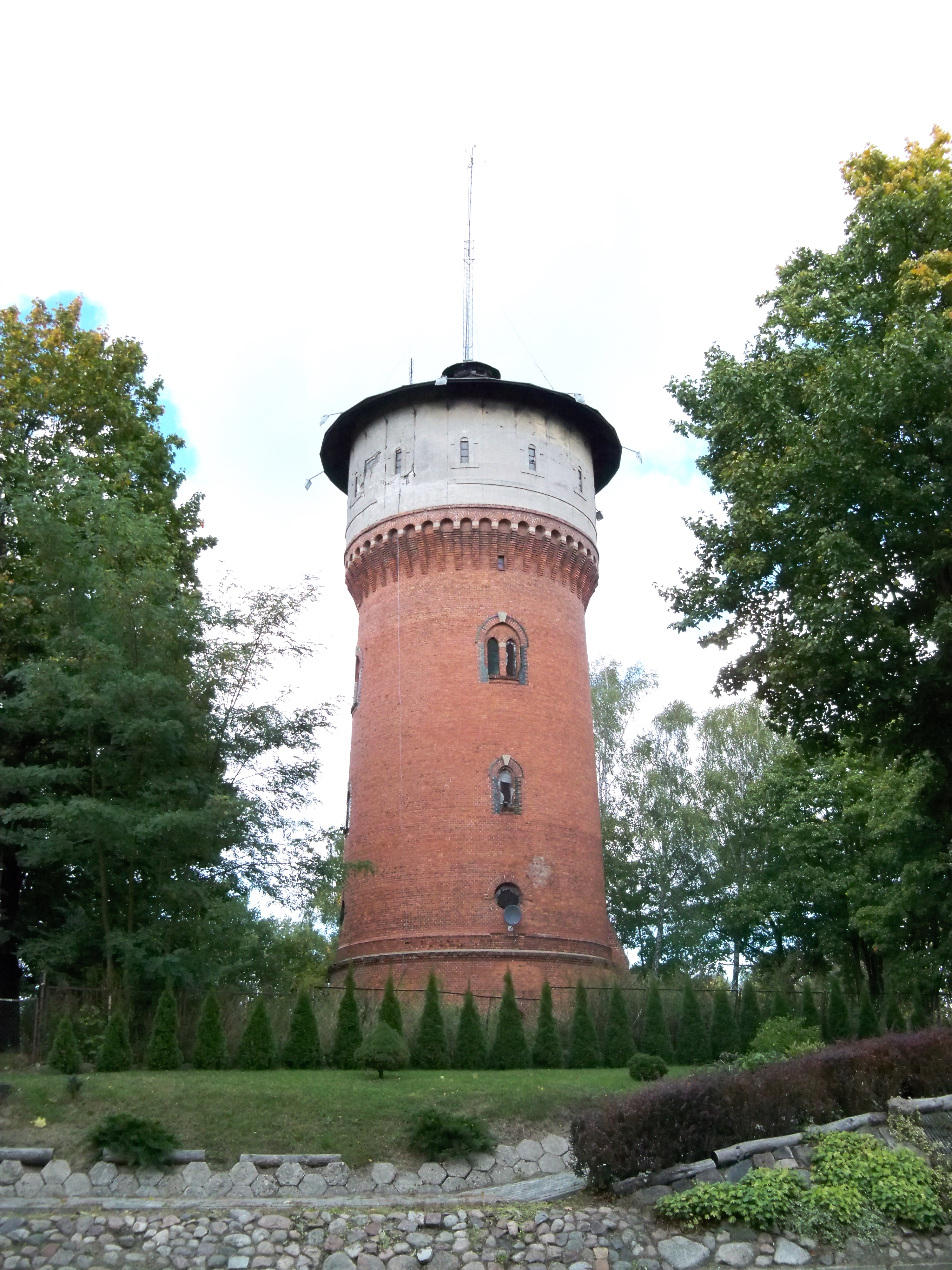 WN/A-3918 z 2.10.1996)